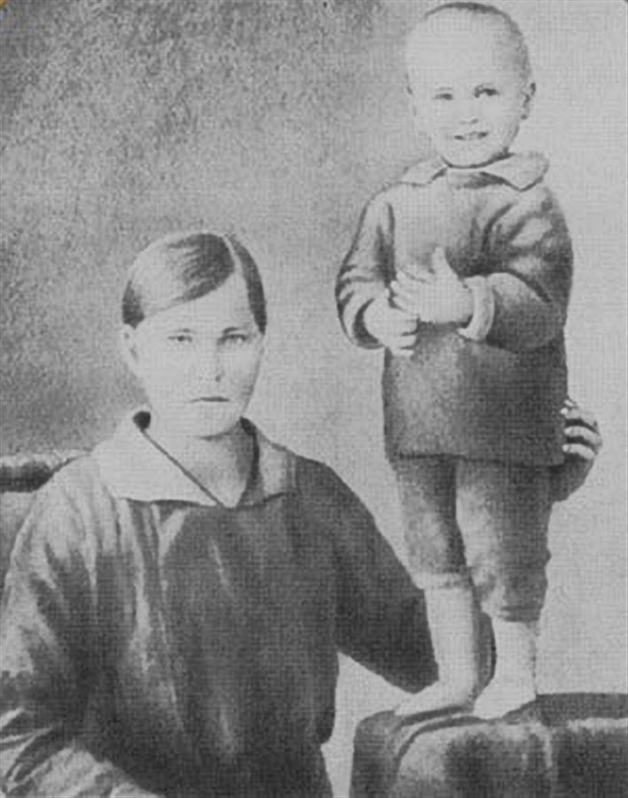 Мария Сергеевна Шукшина с трехлетним Васей, 1932 год